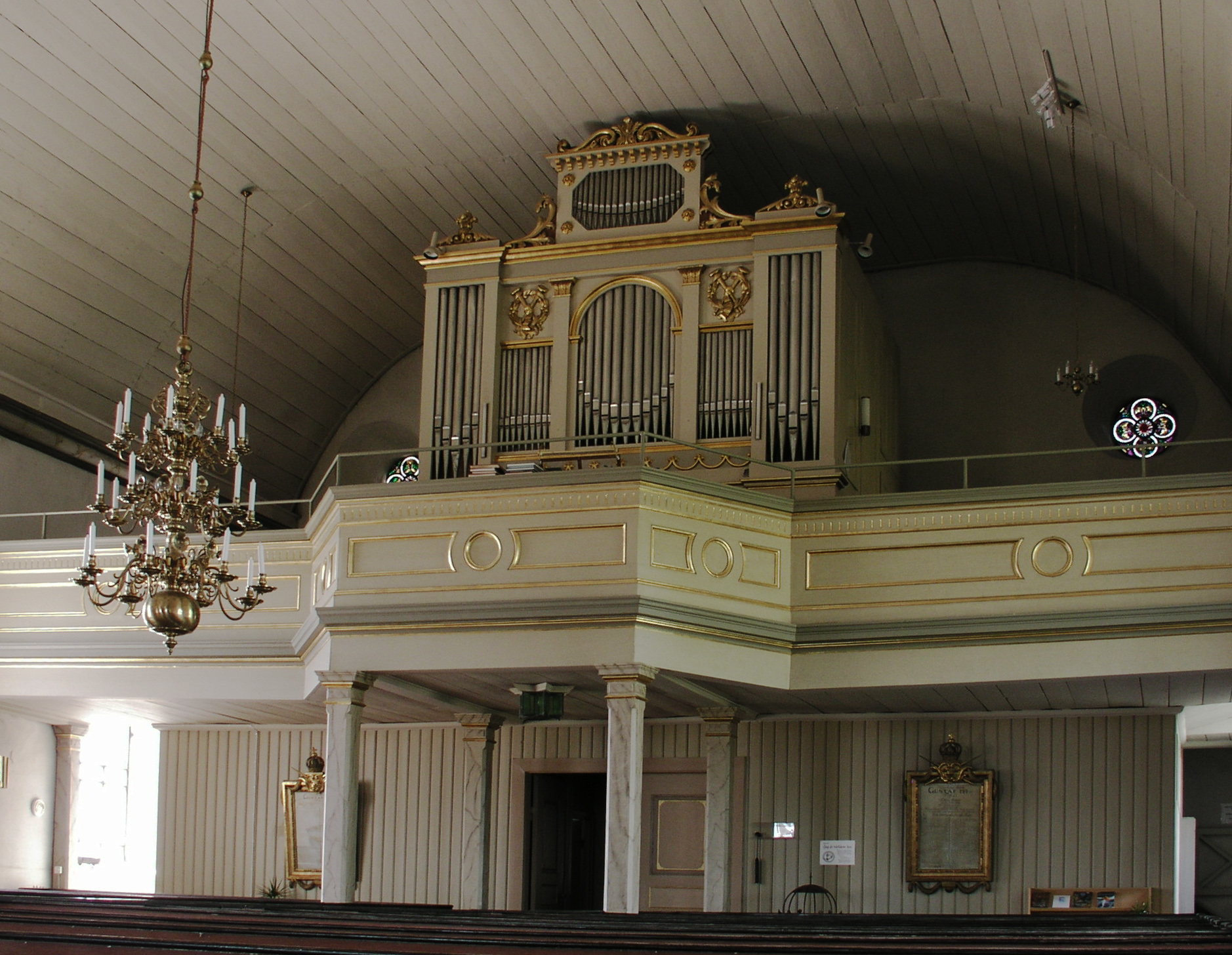 Lerbäcks kyrka, Askersund, Sweden. Organ.